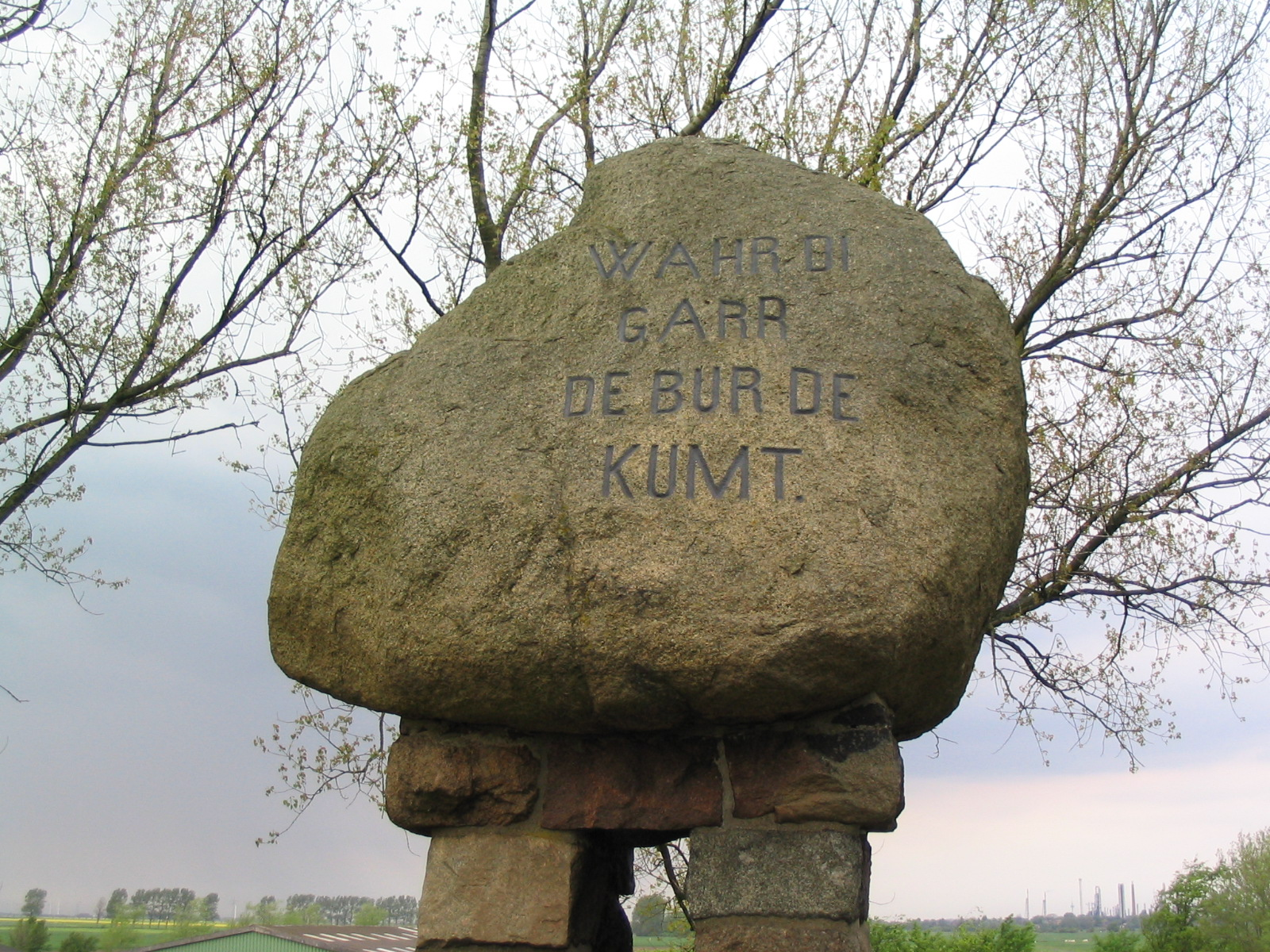 Dusendüwelswarf between Epenwöhrden and Hemmingstedt, momument to remember the Battle of Hemmingstedt